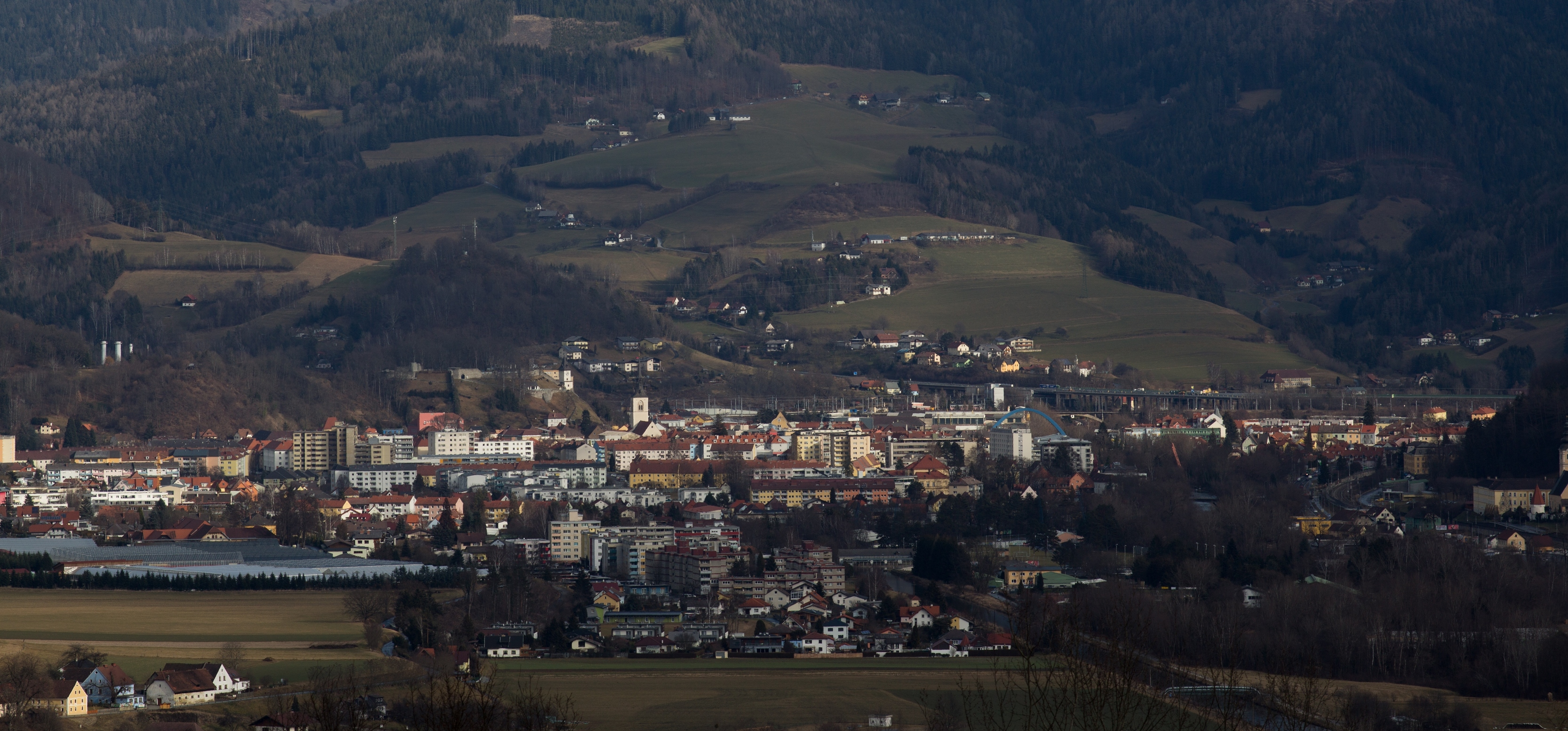 Bruck an der Mur, Steiermark, Austria